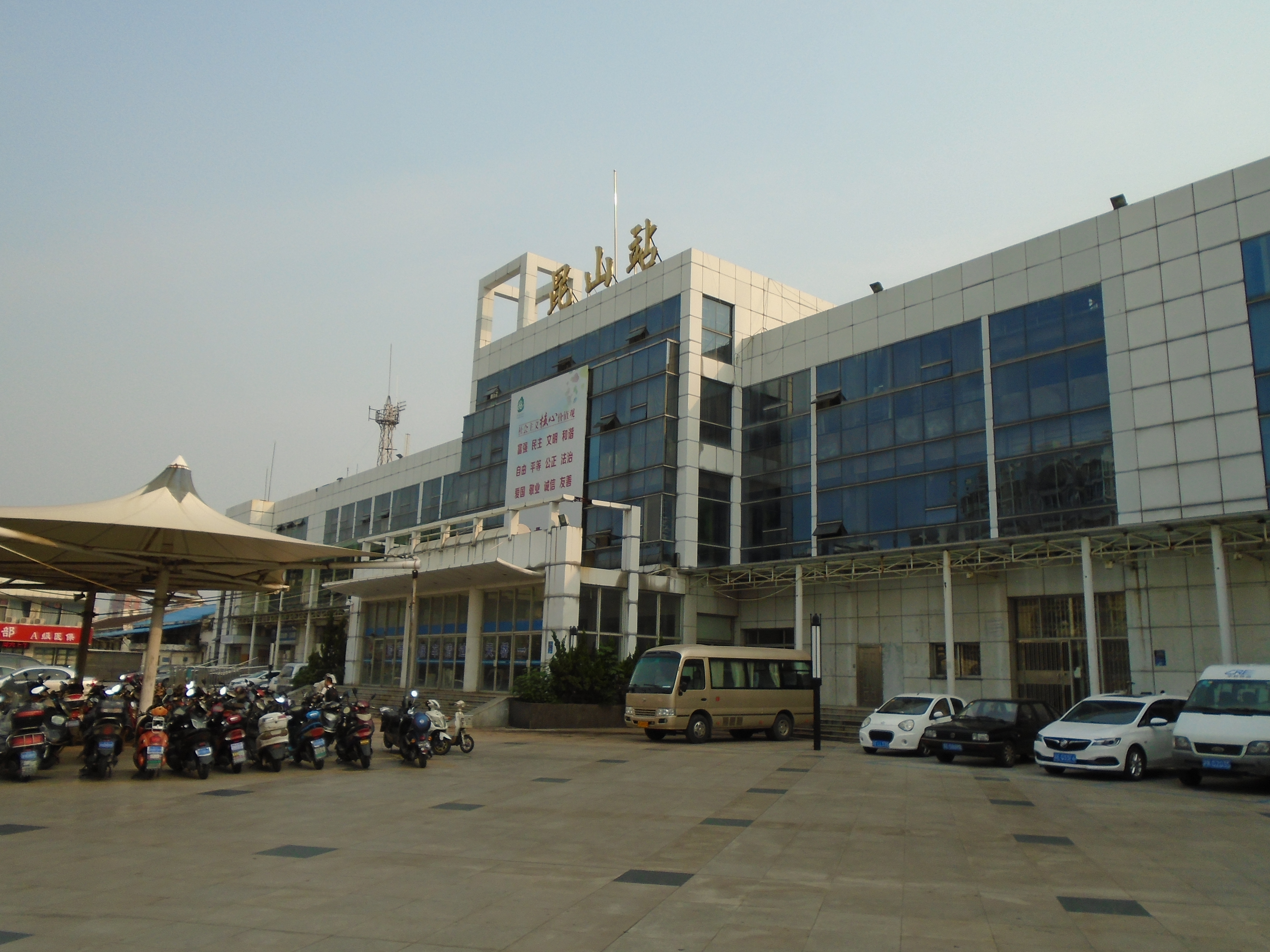 2019年6月的昆山站北广场